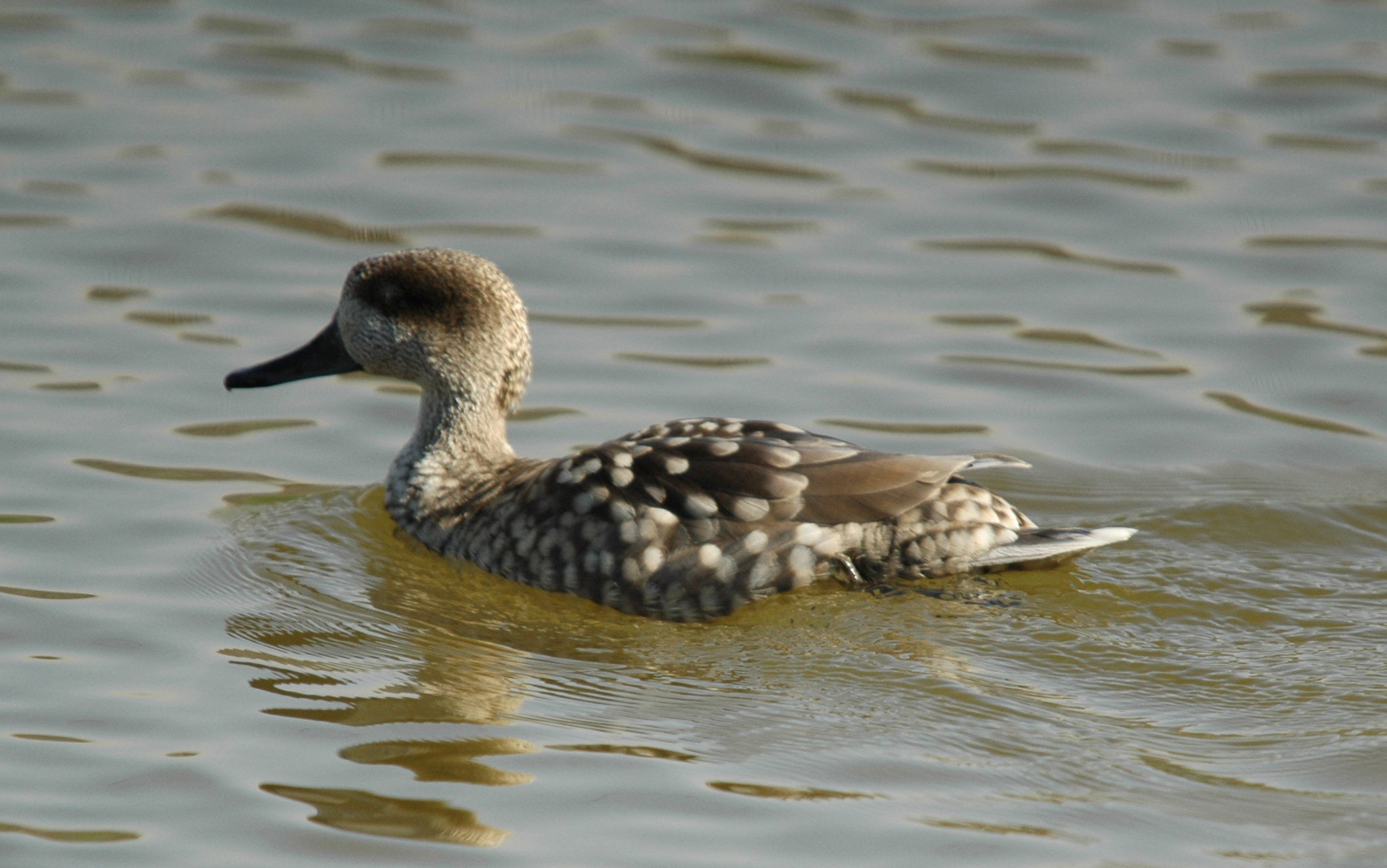 Marbled Duck Marmaronetta angustirostris, Torralba de Calatrava, Castille la Mancha, Spain.